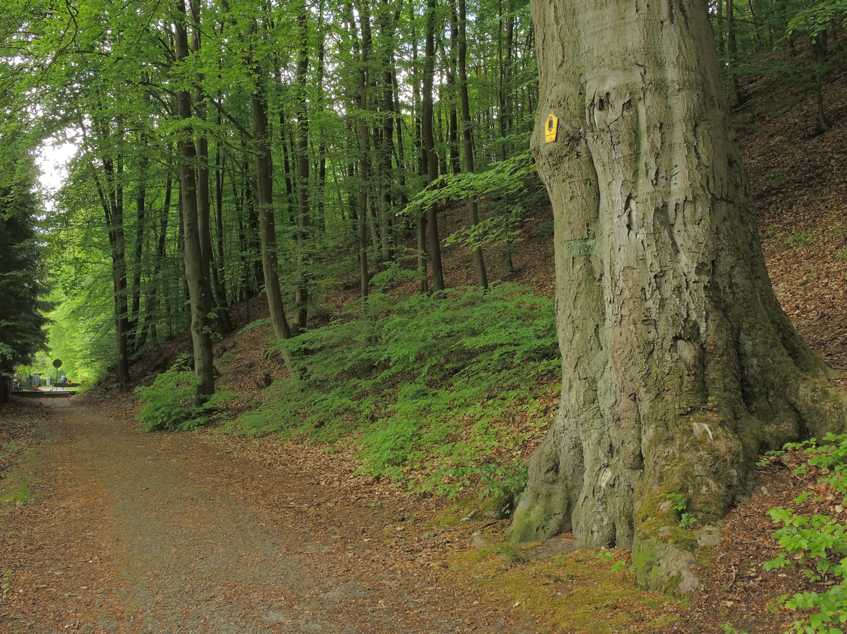 Naturdenkmal-Baum Nummer 39: Stamm der Rot-Buche im Hammerthal in Bad Freienwalde, Landkreis Märkisch-Oderland